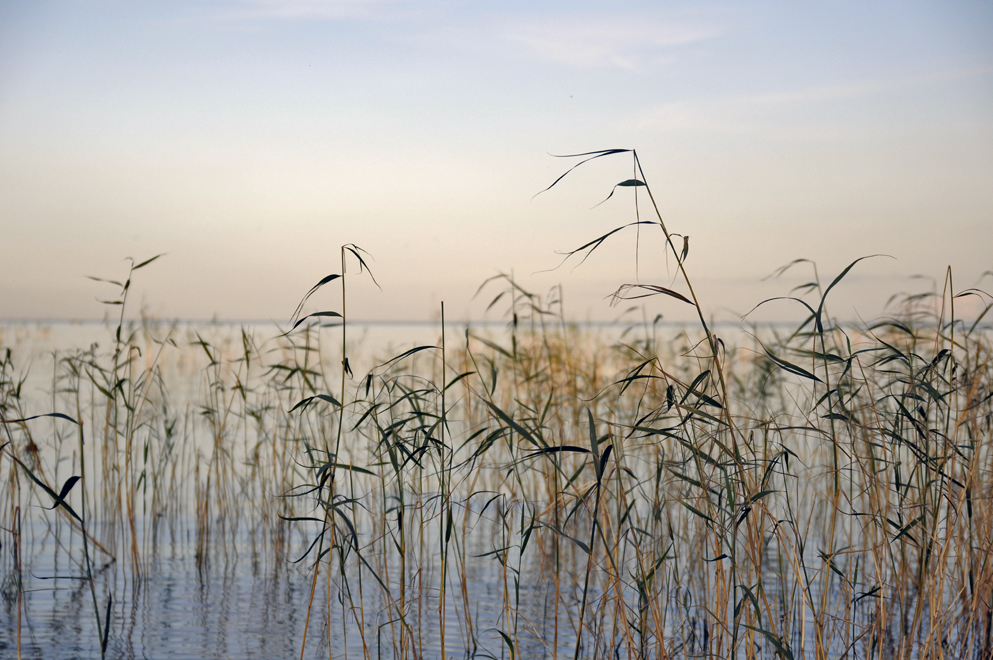 Lake Ladoga in Vaganovo